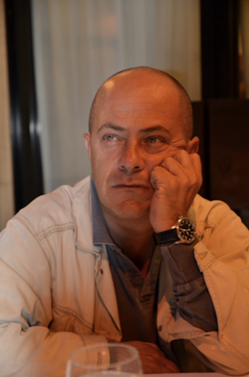 Giovanni Benincasa in posa